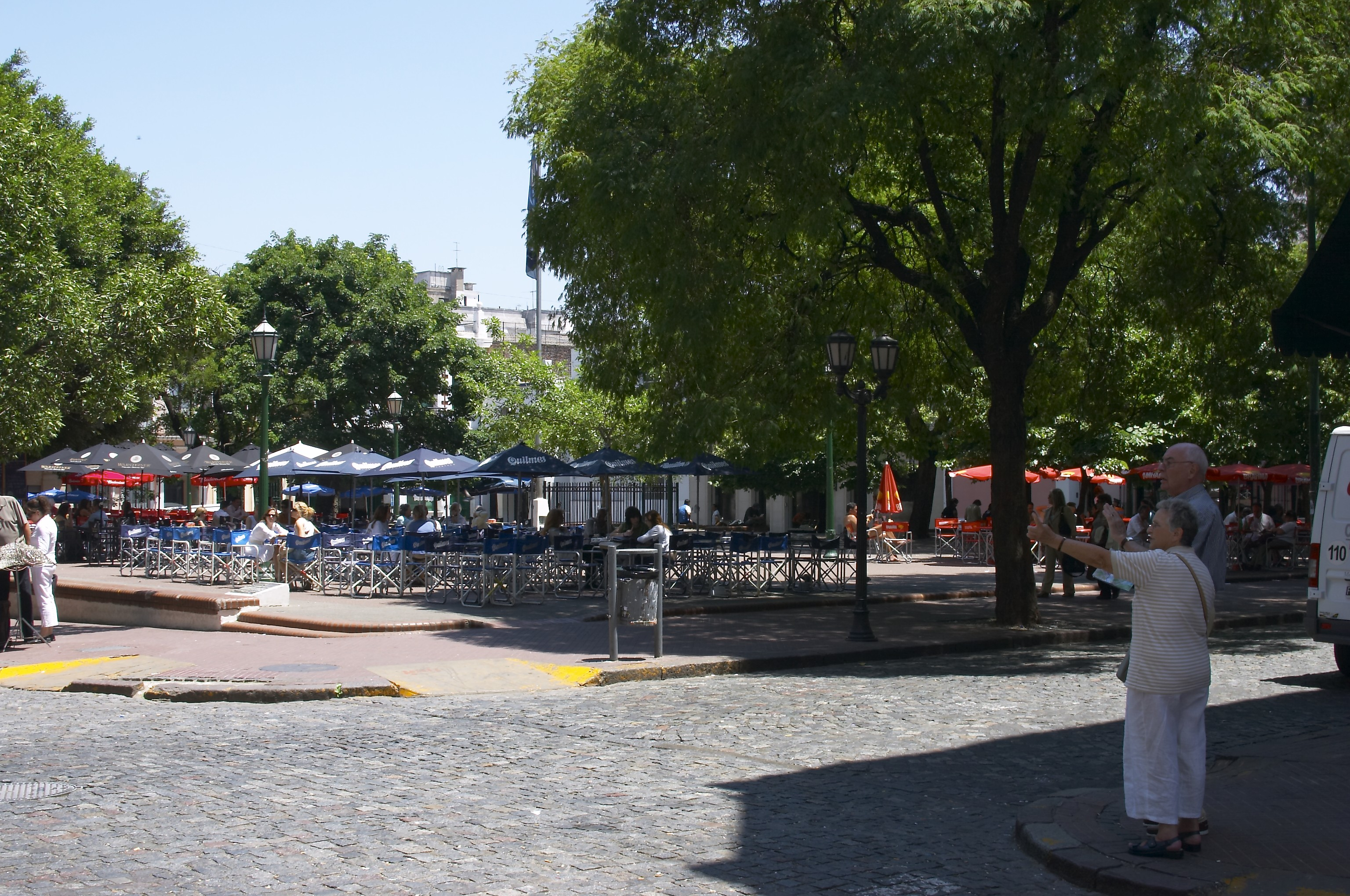 Plaza Dorrego, Buenos Aires, Argentina. Barrio de San Telmo.